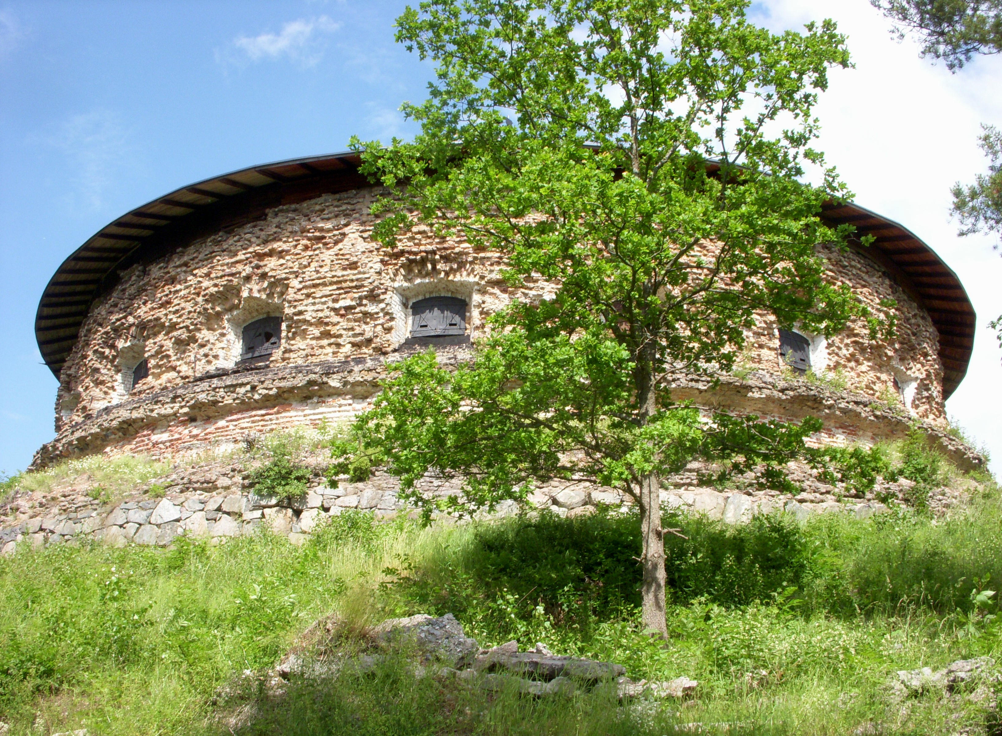 Fredriksborgs fästning i Värmdö kommun